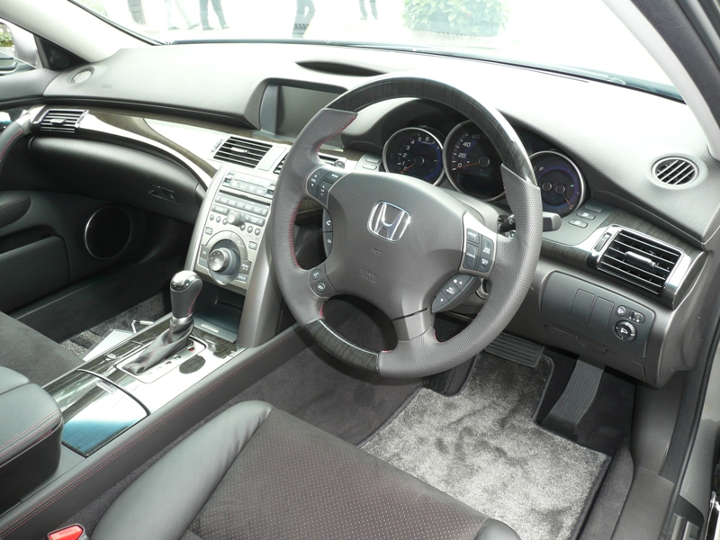 Honda Legend interior.